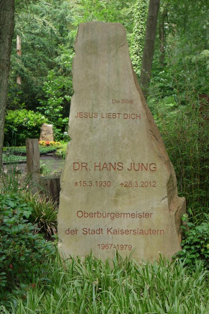 Grab des SPD-Politikers Hans Jung (1930-2012) auf dem Hauptfriedhof Kaiserslautern